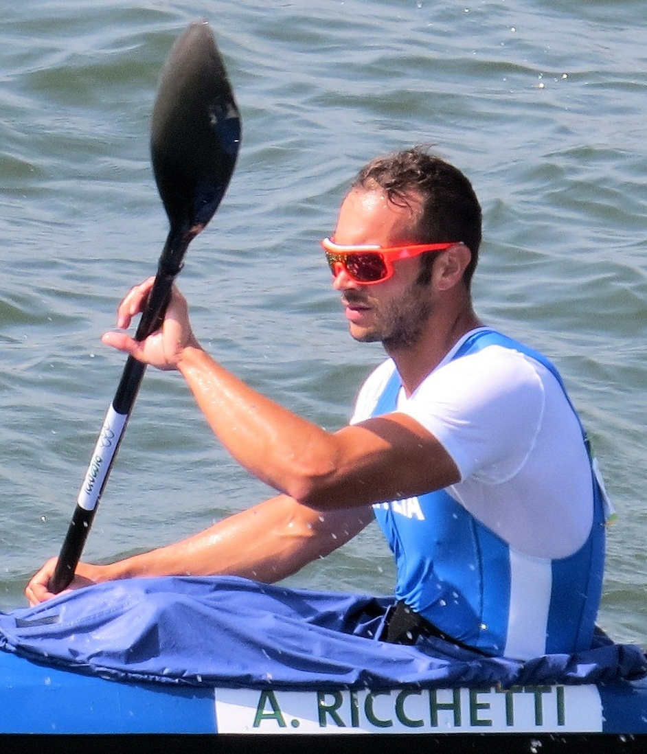 Sx50